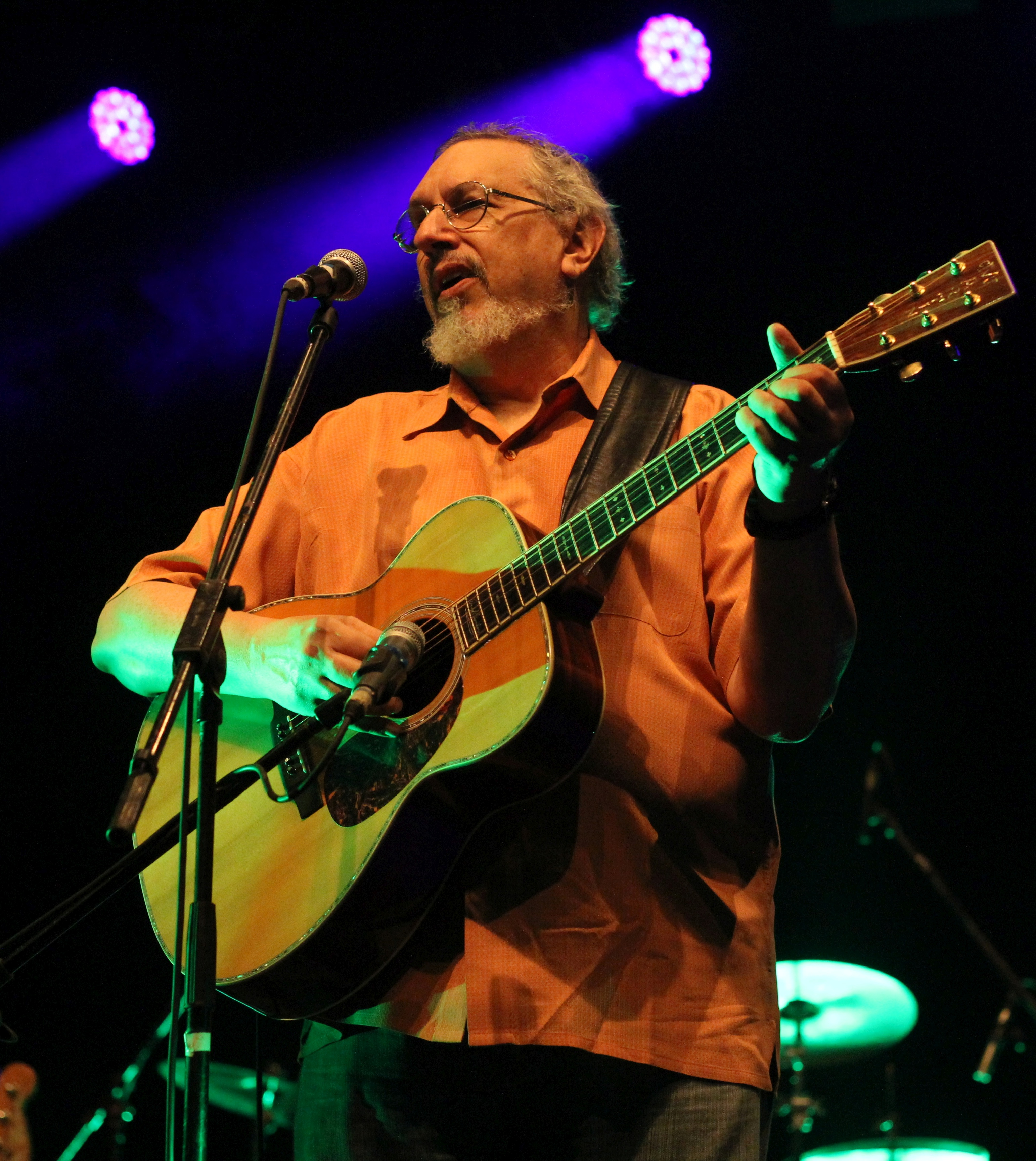 David Bromberg in Bozen 2019